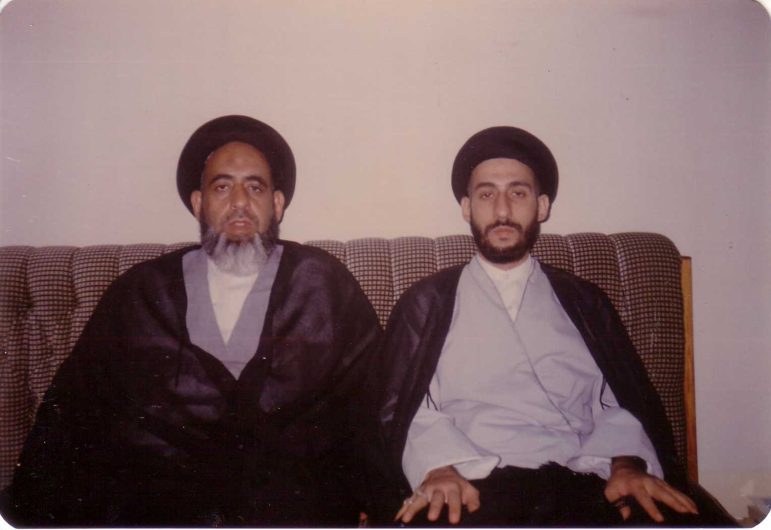 حميد المقدس الغريفي مع والده كمال الدين المقدس الغريفي